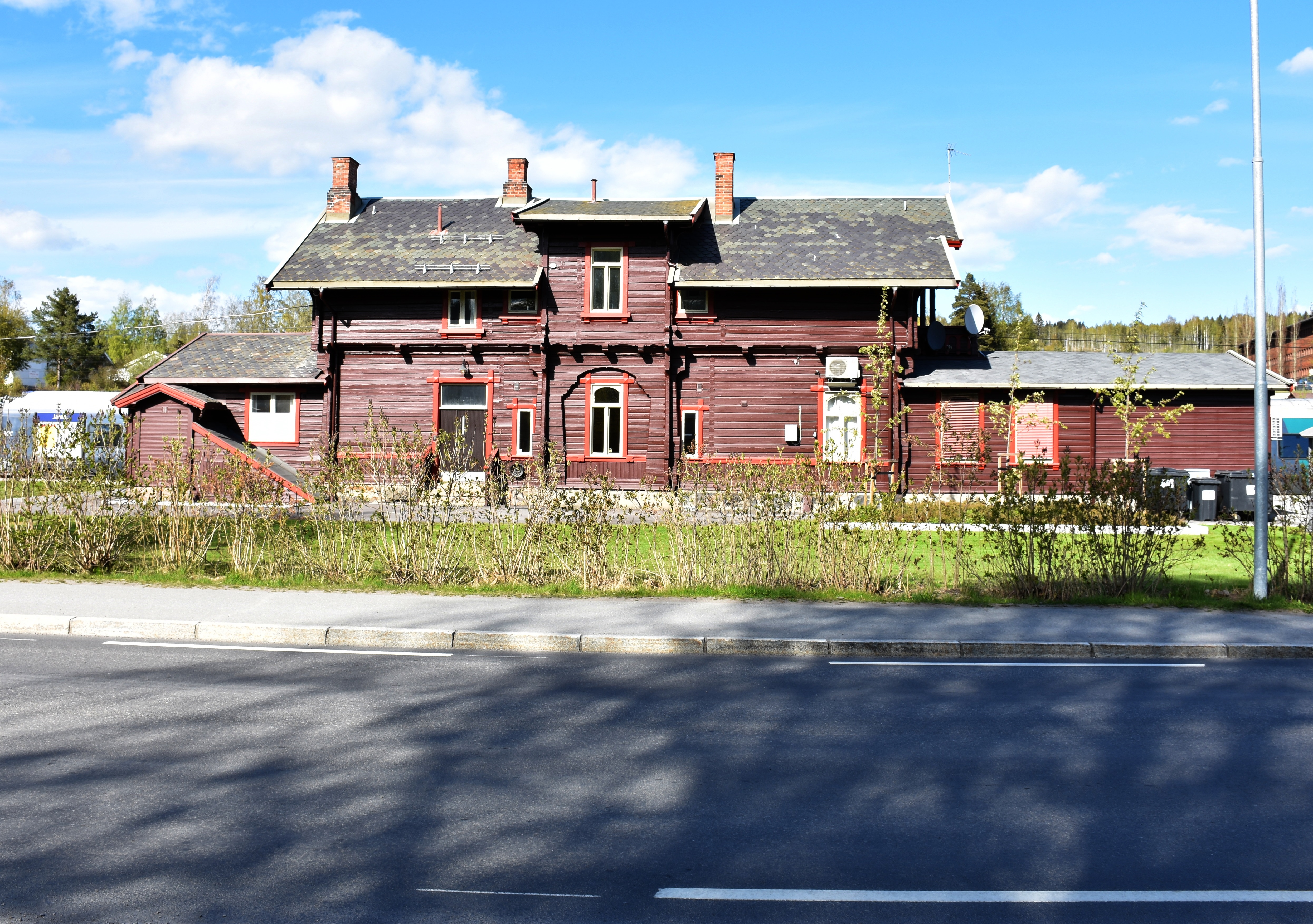 Jarenvegen (fylkesvei 2324) forbi Jaren stasjon